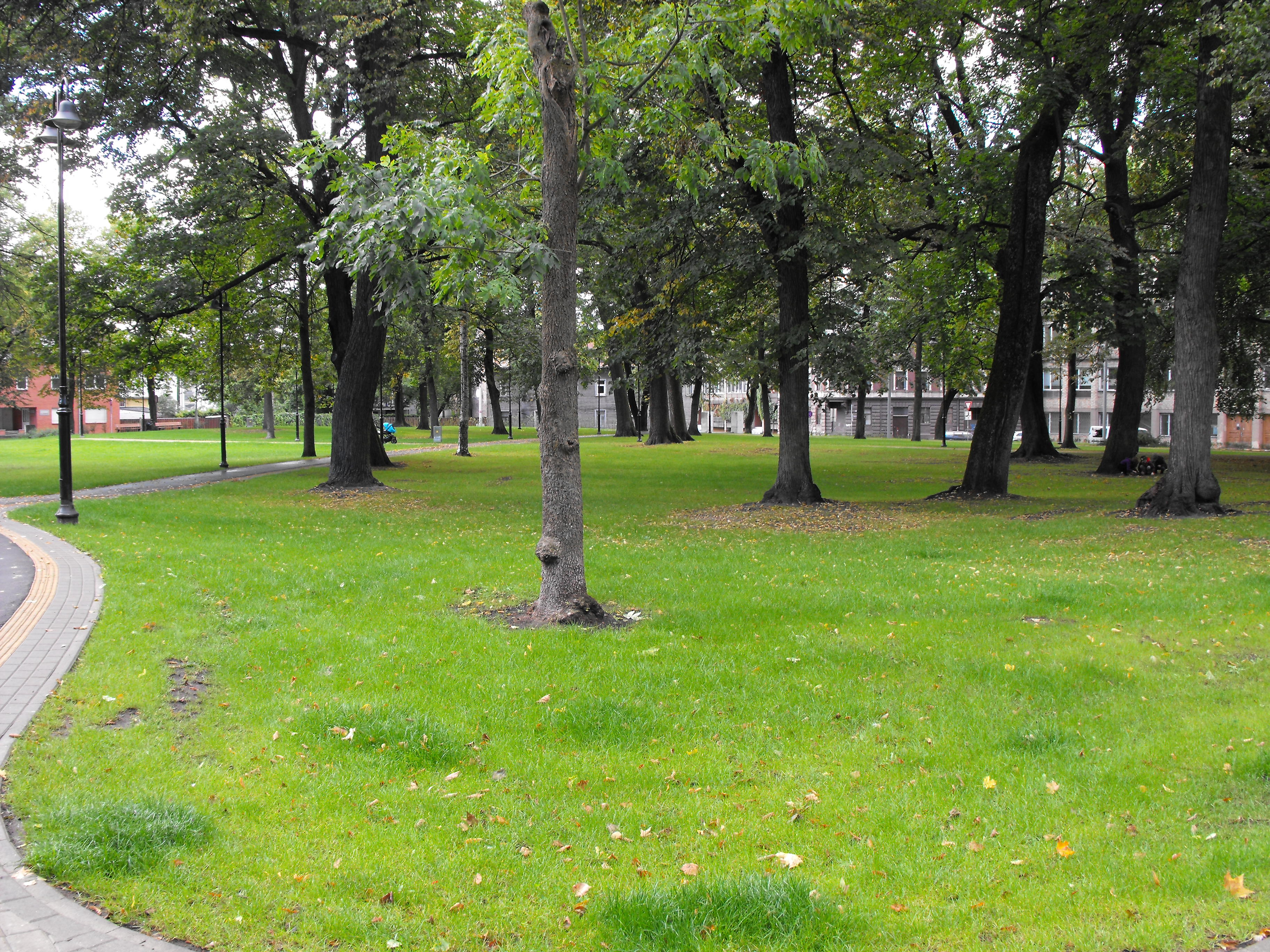 Miera dārzs, Rīga, Jēkabpils iela